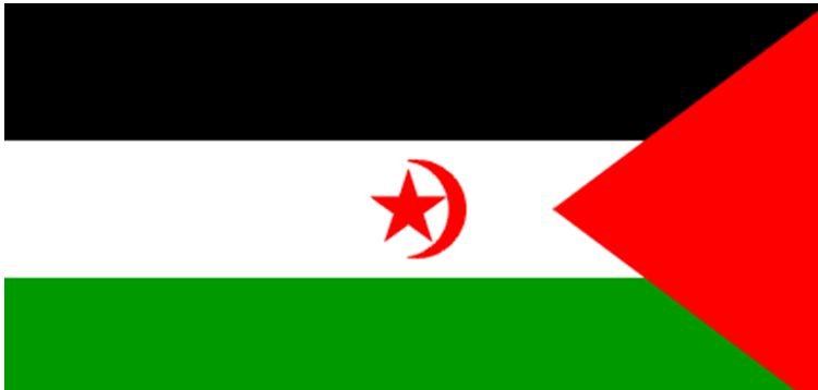 Прапор «паралельної держави» Сахарська Арабська Демократична Республіка (з 1976 р.)